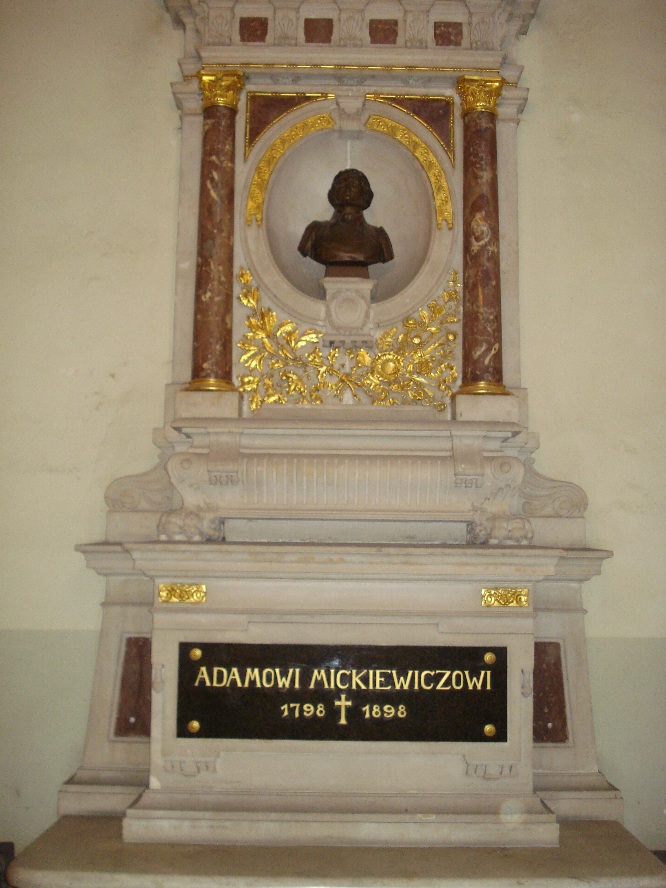 Mickiewicz Monument in the St. John Church in Vilnius